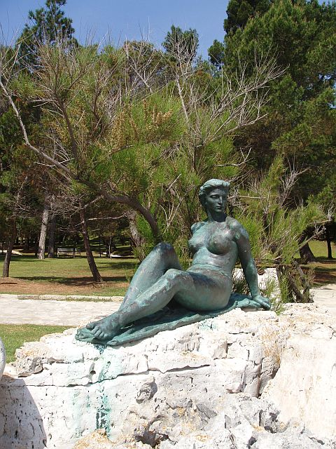 Brioni, 28. maj 2006.